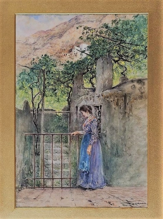 Francesco Mancini, detto Lord (1830-1905) - Capri seconda metà del XIX secolo